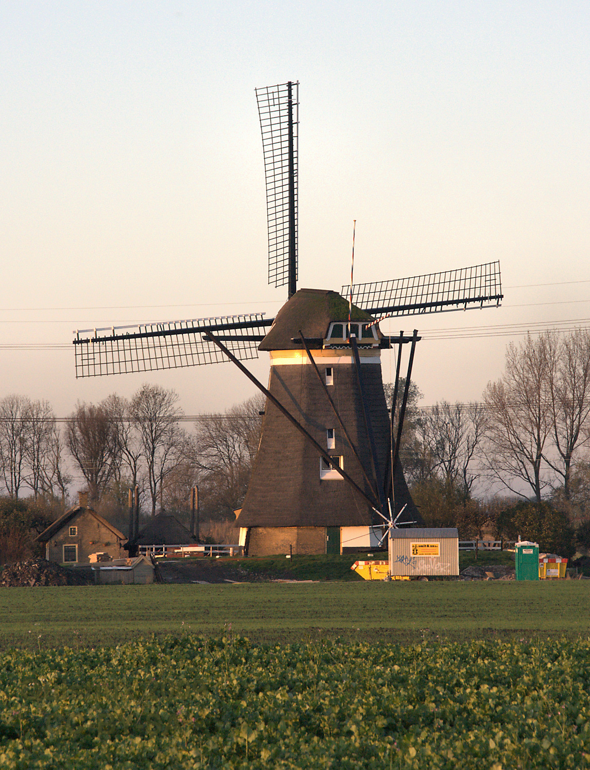 Zevenhuizen-Moerkapelle - Tweemanspolder Molen 1 in restauratie